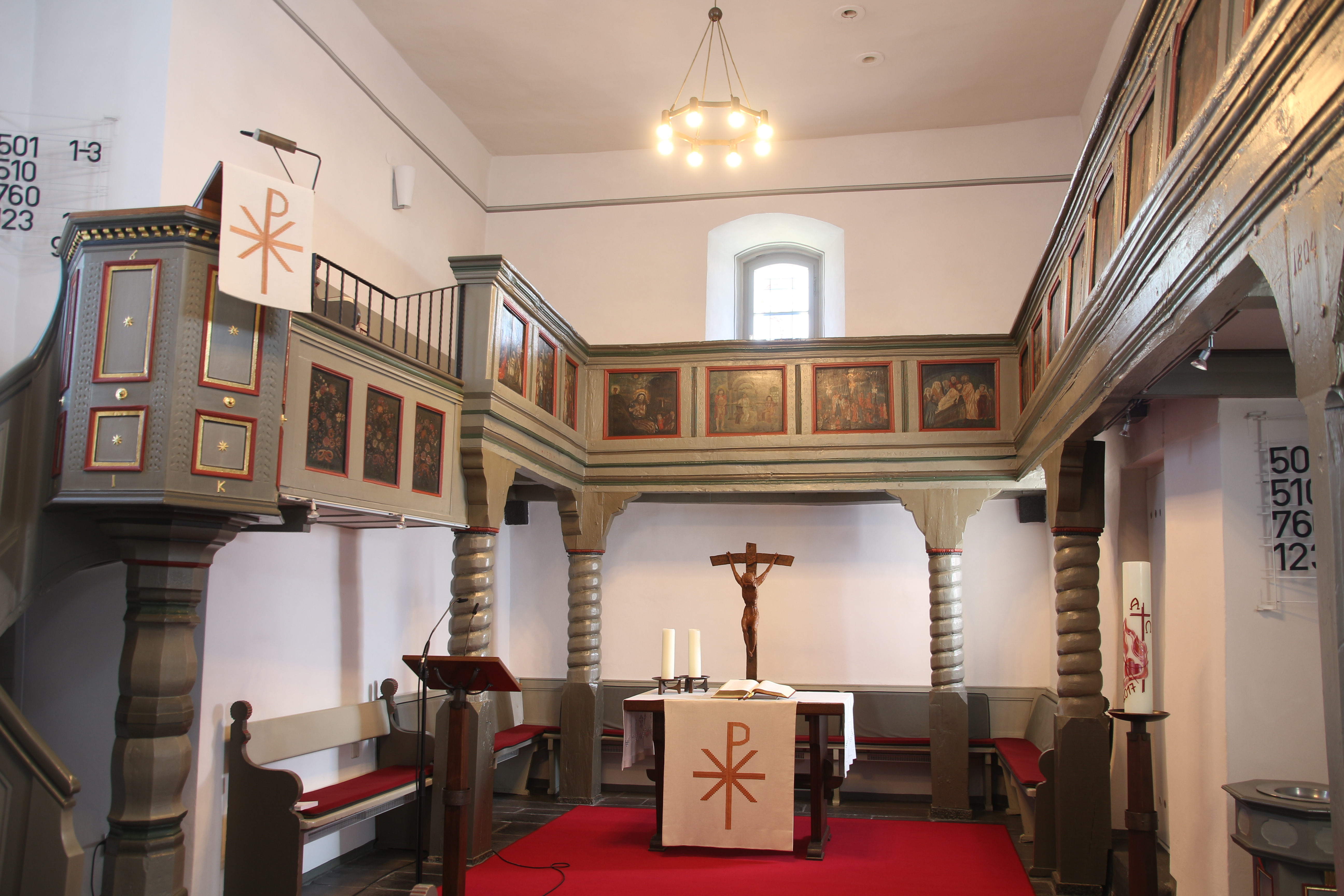 Siehe Bild und Dateiname